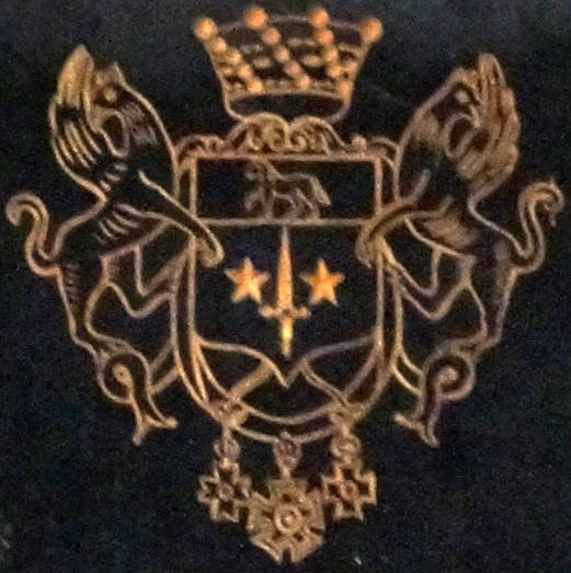 Armes du général Nicolas Broussier, présentée en l'église de Ville sur Saulx.